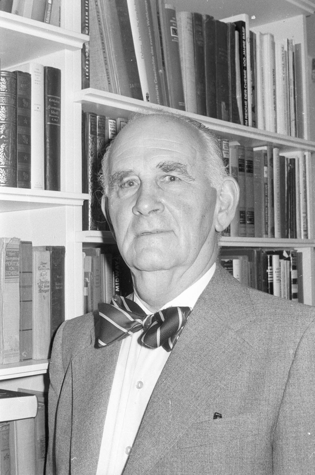 feiert am 17.12.1974 seinen 70. Geburtstag. Er war von 1963 bis 1965 NATO-Befehlshaber für die Ostseezugänge und von 1966 bis 1970 Ratsherr für die CDU in der Stadtverordnetenversammlung.